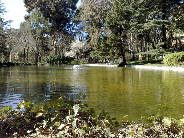 Lago del Parque Quinta de los Molinos de Madrid (España)